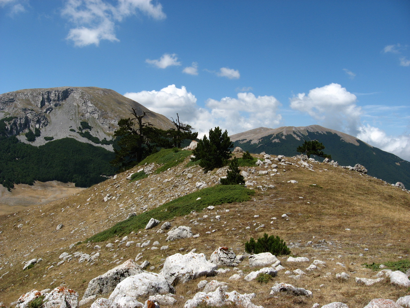 Monte Pollino e Serra del Prete dal contrafforte ovest di Serra delle Ciavole. Trees are Pinus heldreichii